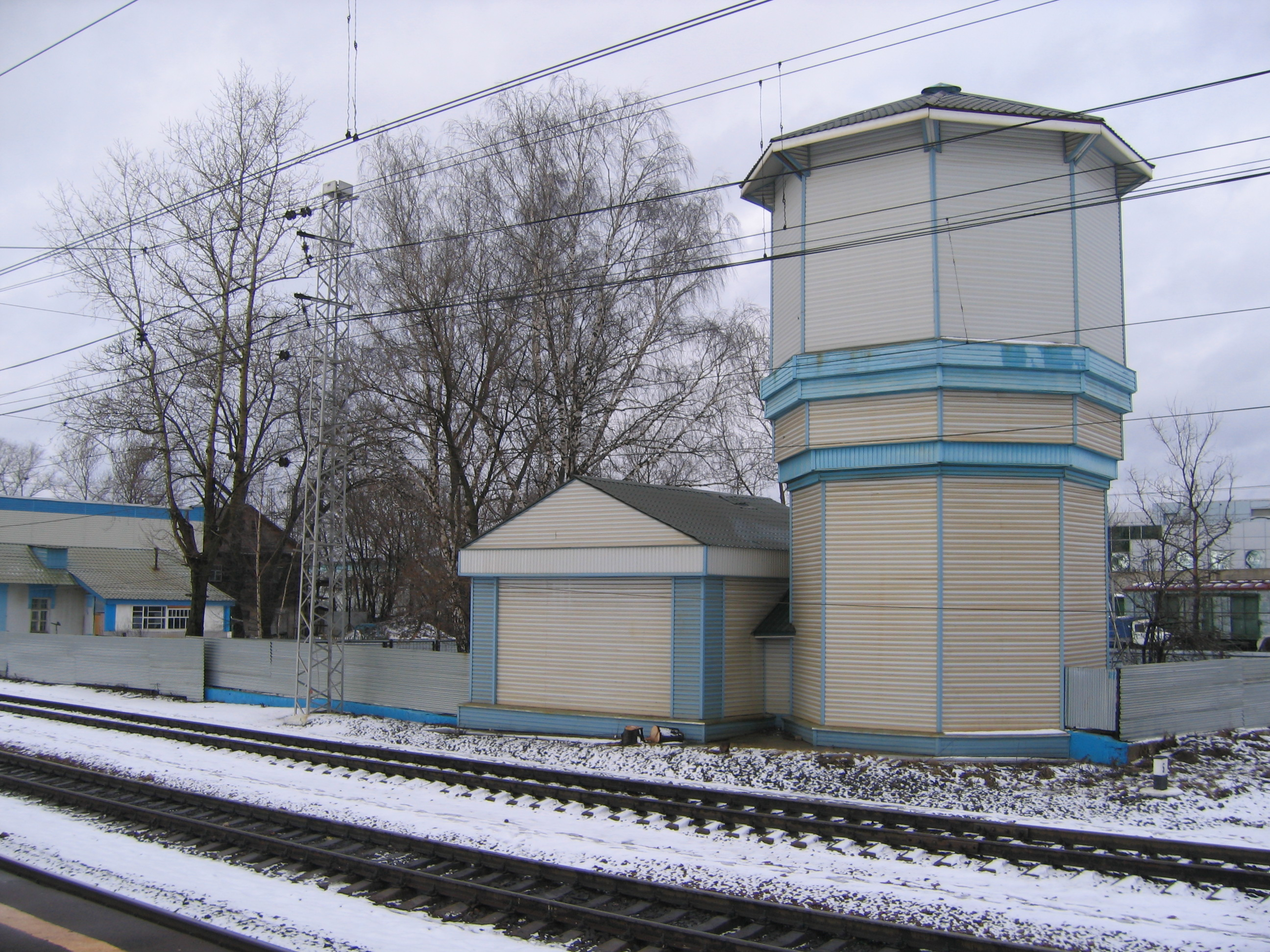 Водонапорная башня на станции Внуково